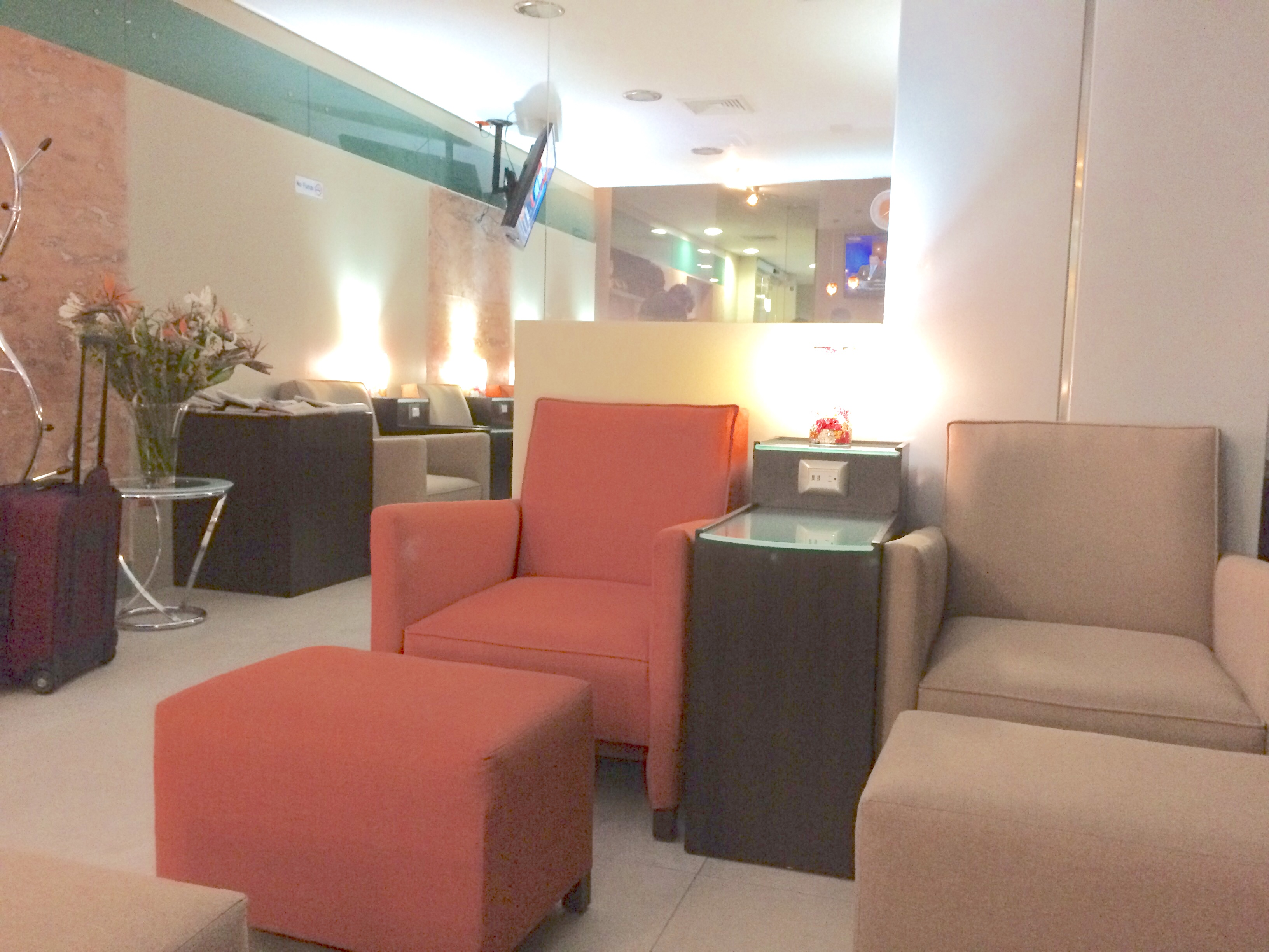 Salón VIP Caral del Aeropuerto de Mérida.